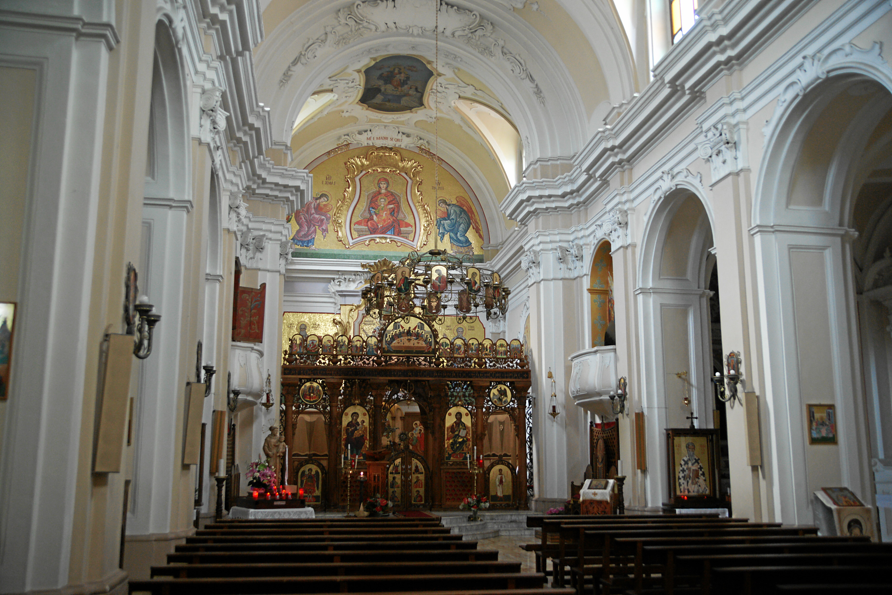 Chiesa madre, Civita: Innenansicht